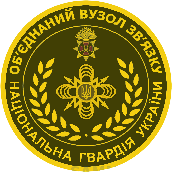 Нарукавний знак, об'єднаний вузол зв'язку, Національна гвардія України